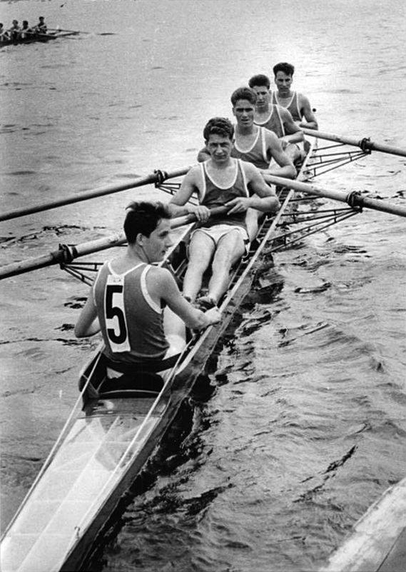 BSG Motor Magdeburg, Vierer Zentralbild Funck- 17.7.1955 DDR-Meisterschaften der Ruderer in Grünau Am Sonntag, dem 17.7.1955, fand auf dem Olympiakurs in Grünau die DDR-Rudermeisterschaft 1955 statt. In allen Wettbewerben gab es packende Kämpfe, die eindeutig den Leistungsanstieg unserer Ruderer unter Beweis stellten. UBz: Im Leichtgewichts-Vierer m. St. verteidigte die BSG Motor Magdeburg ihren Titel erfolgreich und wurde erneut DDR-Meister. Die siegreiche Mannschaft.